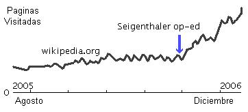 modificación al castellano desde esta versión; 1